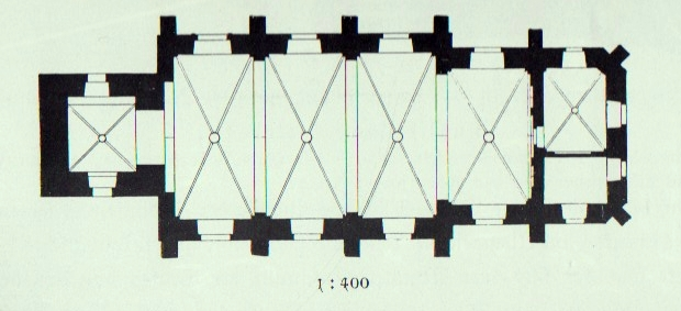 St. Nikolaus Altengeseke\Grundriß von St. Nikolaus in Altengeseke, nach Ludorff, Bau- und Kunstdenkmäler von Westfalen, Kreis Lippstadt, vor 1912.jpg